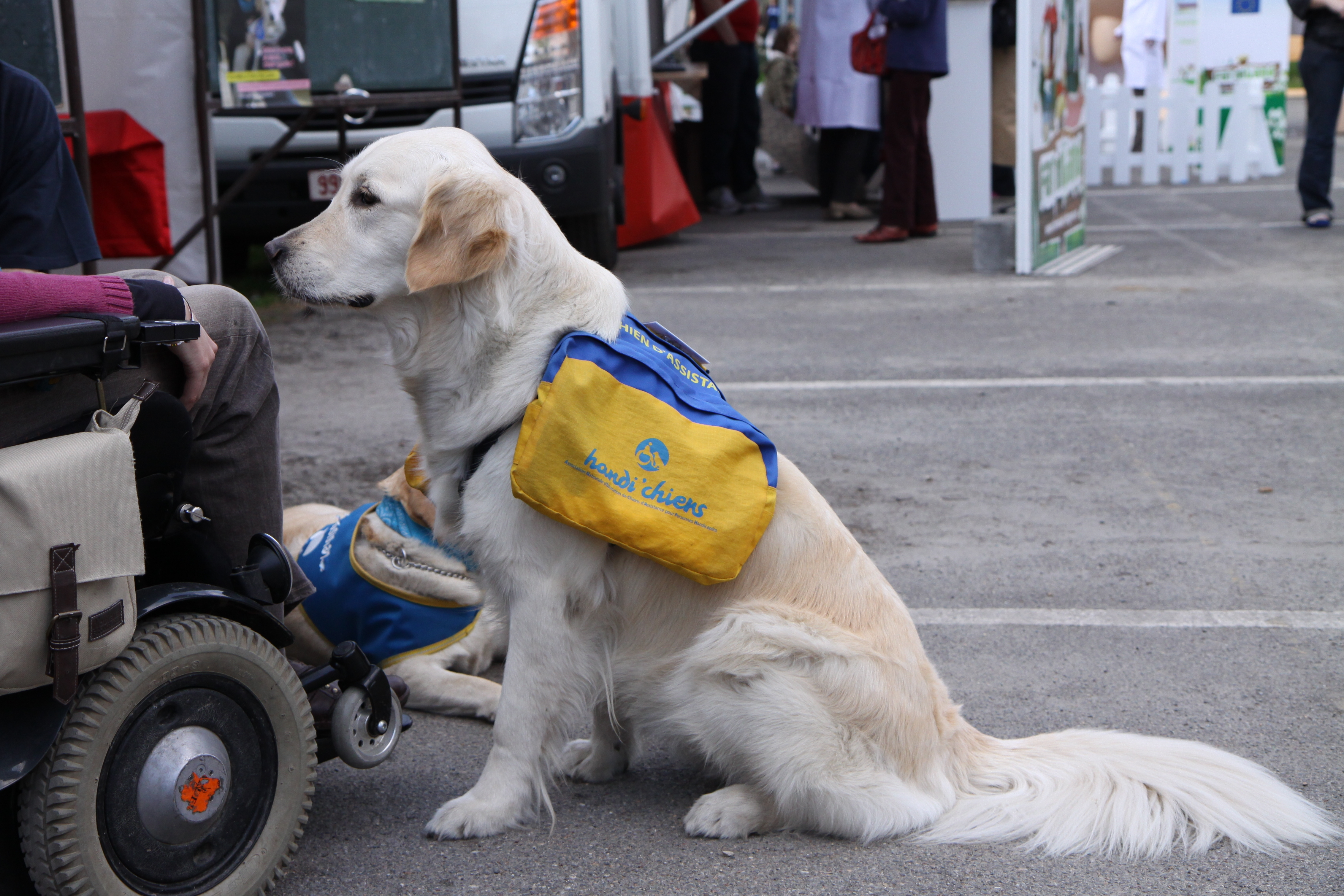 Chien d'assistance aux handicapés moteurs.